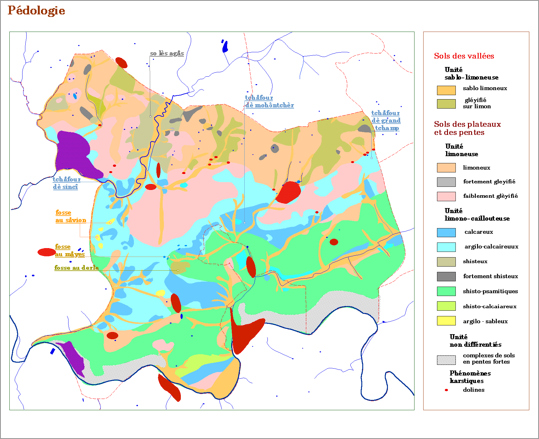 Pedologie d'Olne